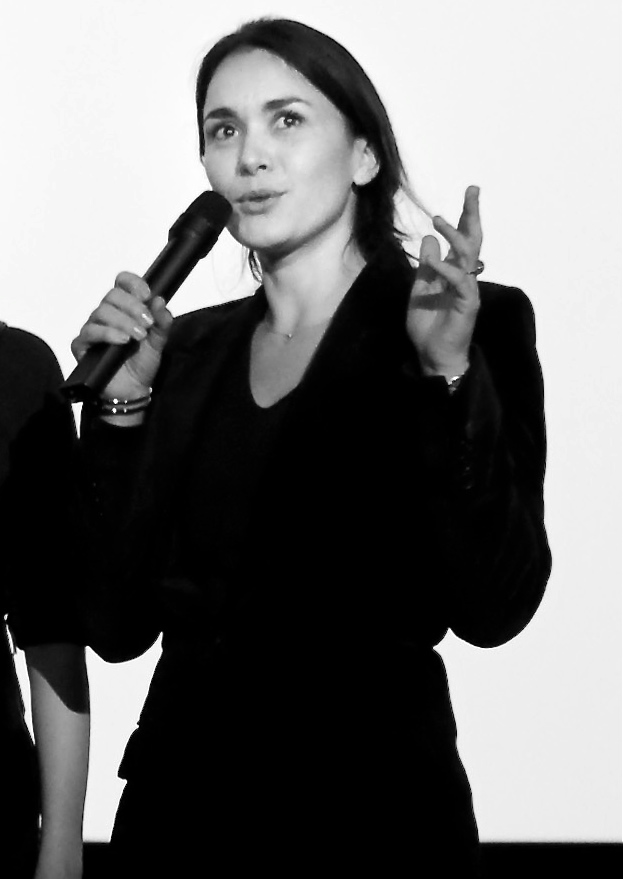 Eléonore Faucher présente "Gamines", film adapté du roman autobiographique de Sylvie Testud, en avant-première à Lyon.